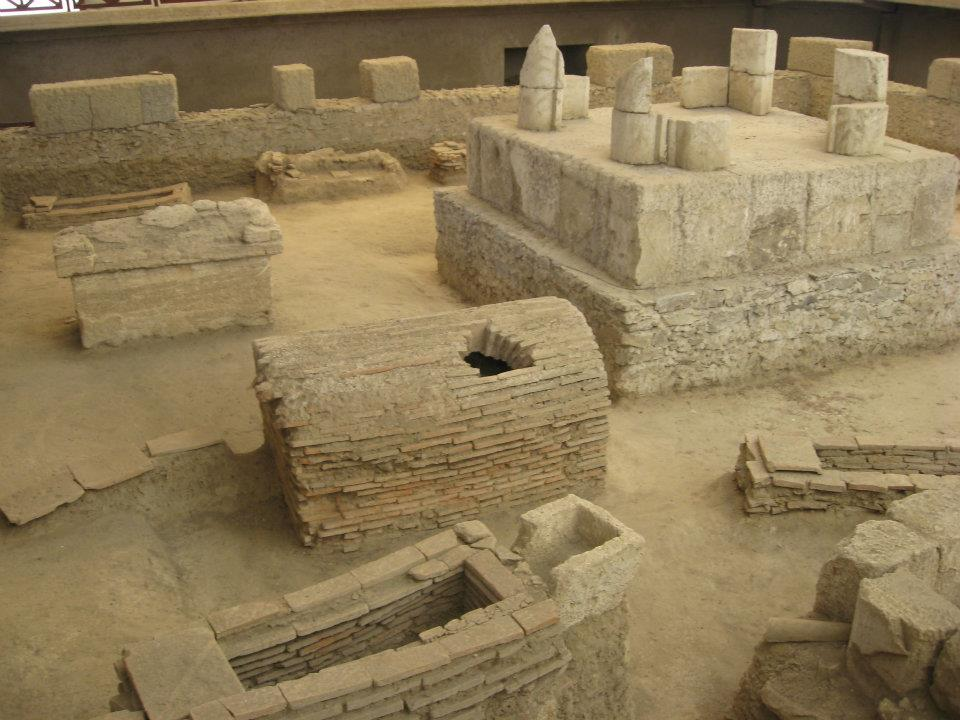 Римски војни логор